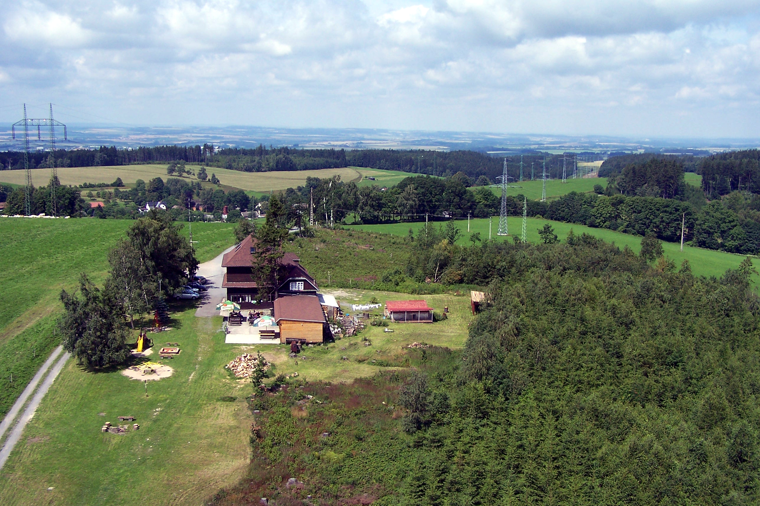 Obec Kozlov a chata M. Švabinského z rozhledny Kozlovský kopec.